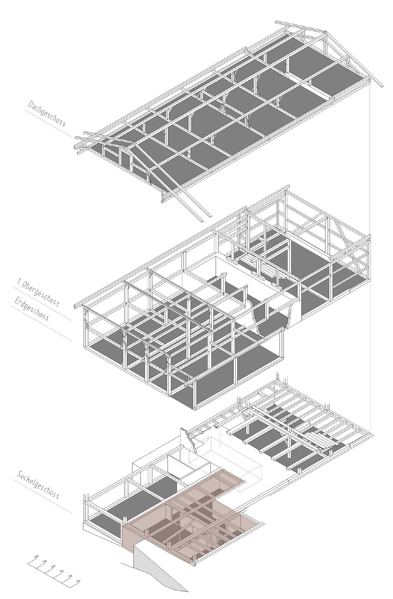 Bauernhaus "Villa Goldonkel" in Pfronten, Isometrie des ganzen Gebäudes